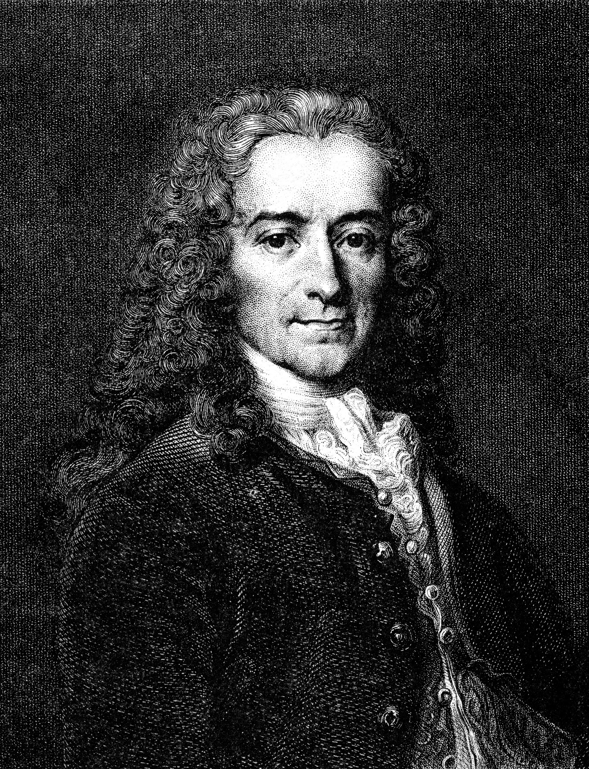 Moreau le Jeune, Portrait Voltaires